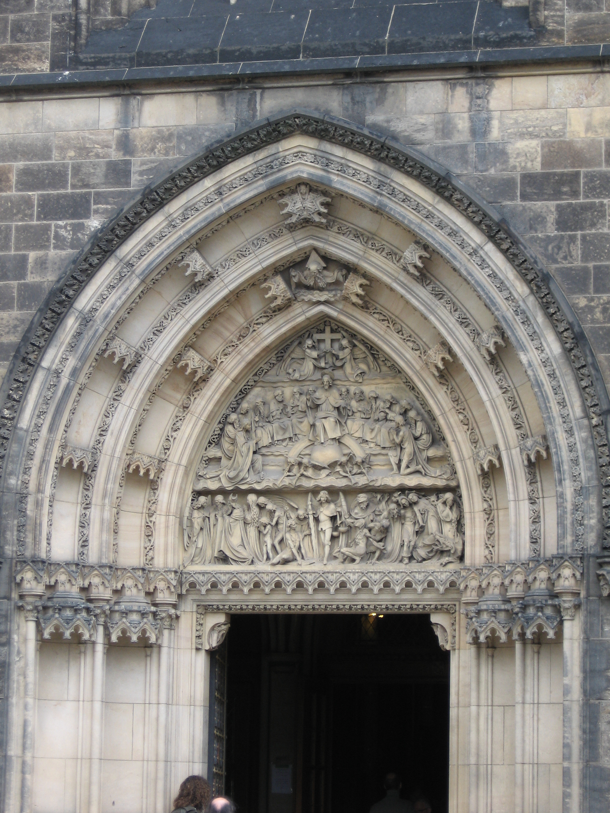 Kapitulní chrám sv. Petra a Pavla - výzdoba nad hlavním vstupem